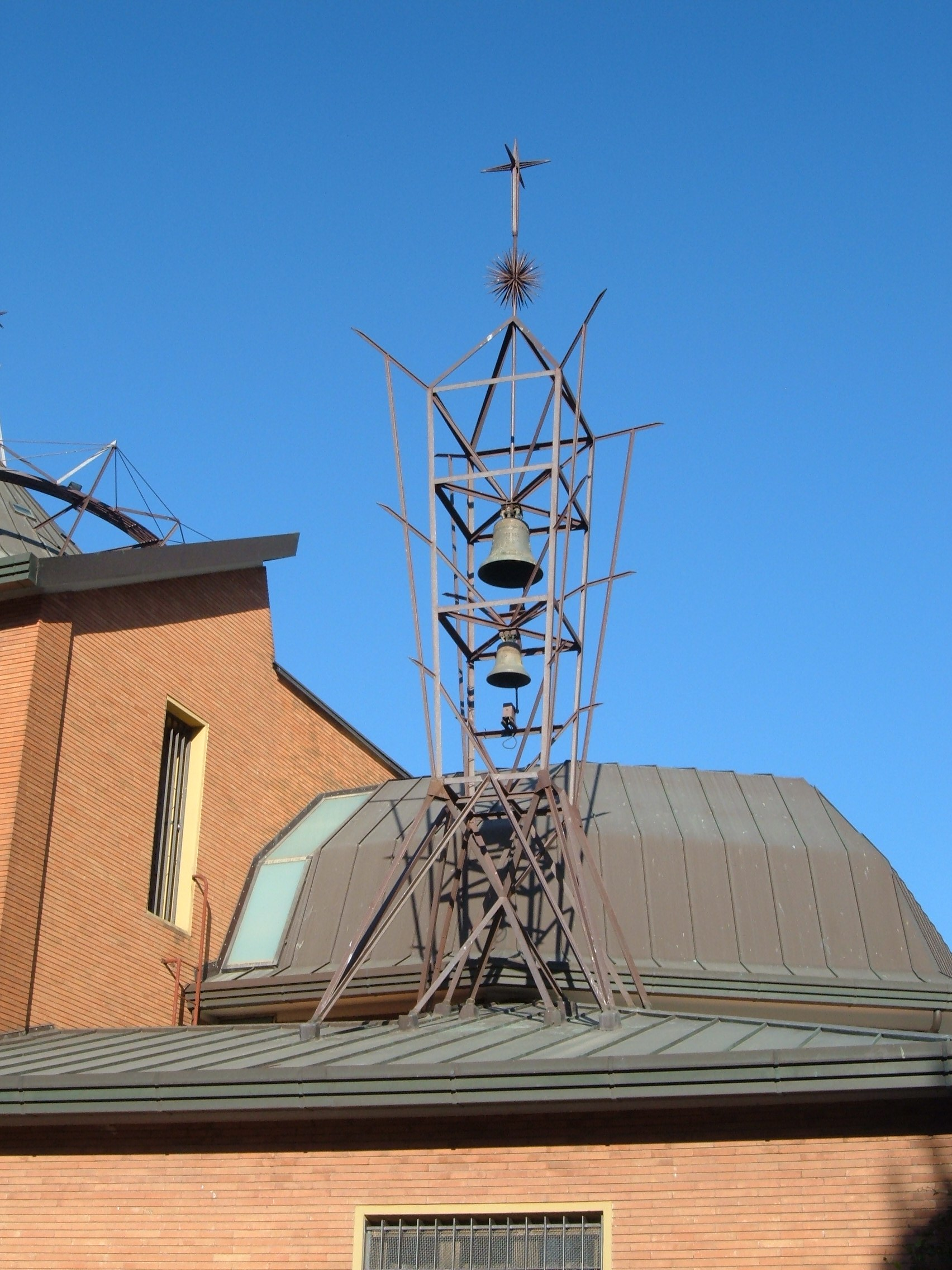 Chiesa della Sacra Famiglia, a Roma, nel quartiere Ostiense, in via David Salinieri.